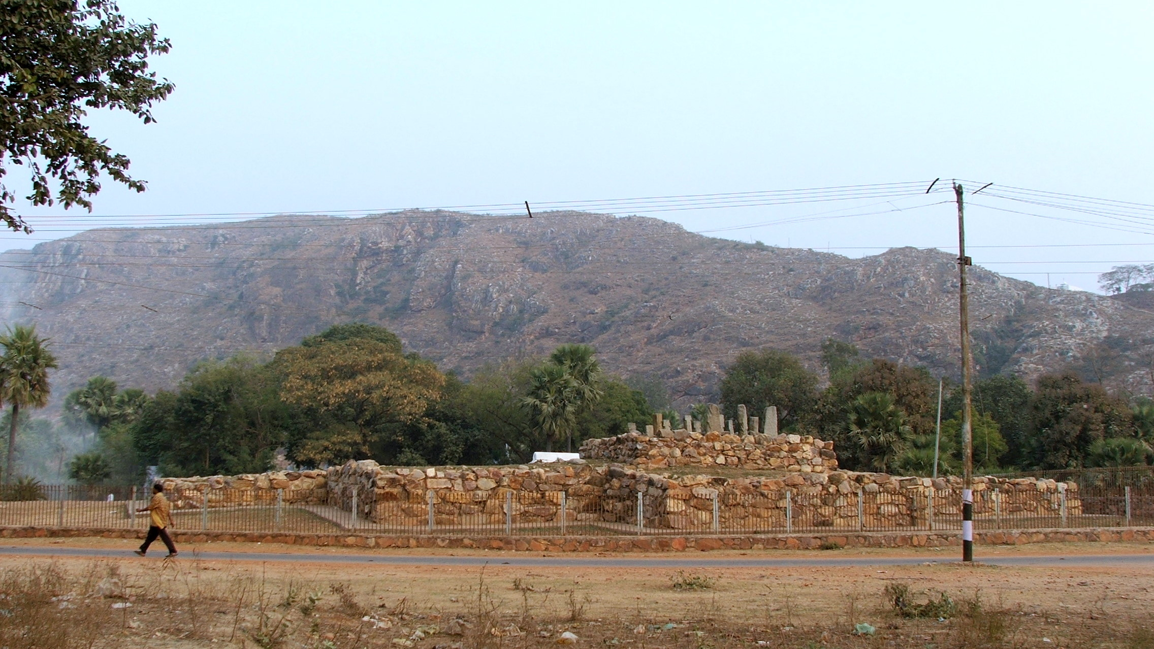 Ajatasatru (Ajatasattu) stupa at Rajgir, India. It is said to contain his ashes.